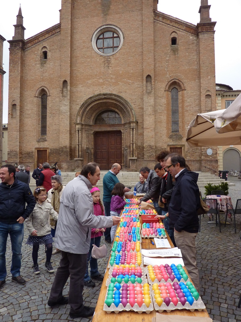 La tradizionale gara del Pont e Cul edizione 2012